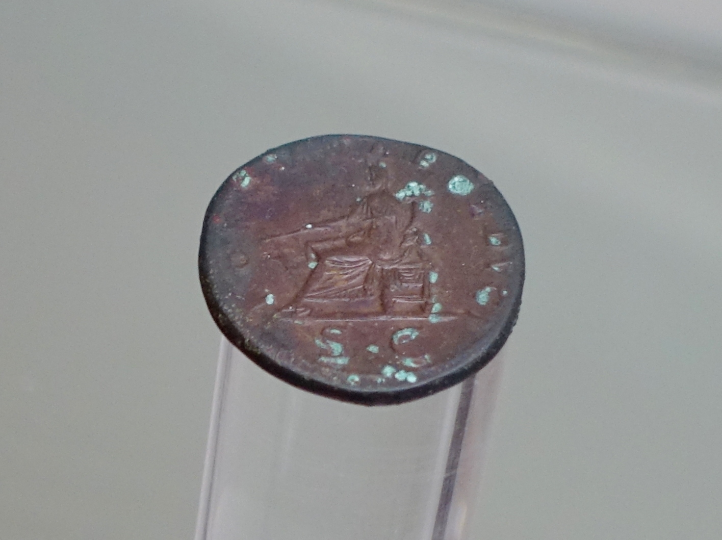 Münze aus der Ausgrabung von Cuccureddus, ausgestellt im archäologischen Museum von Villasimius, Sardinien, Italien